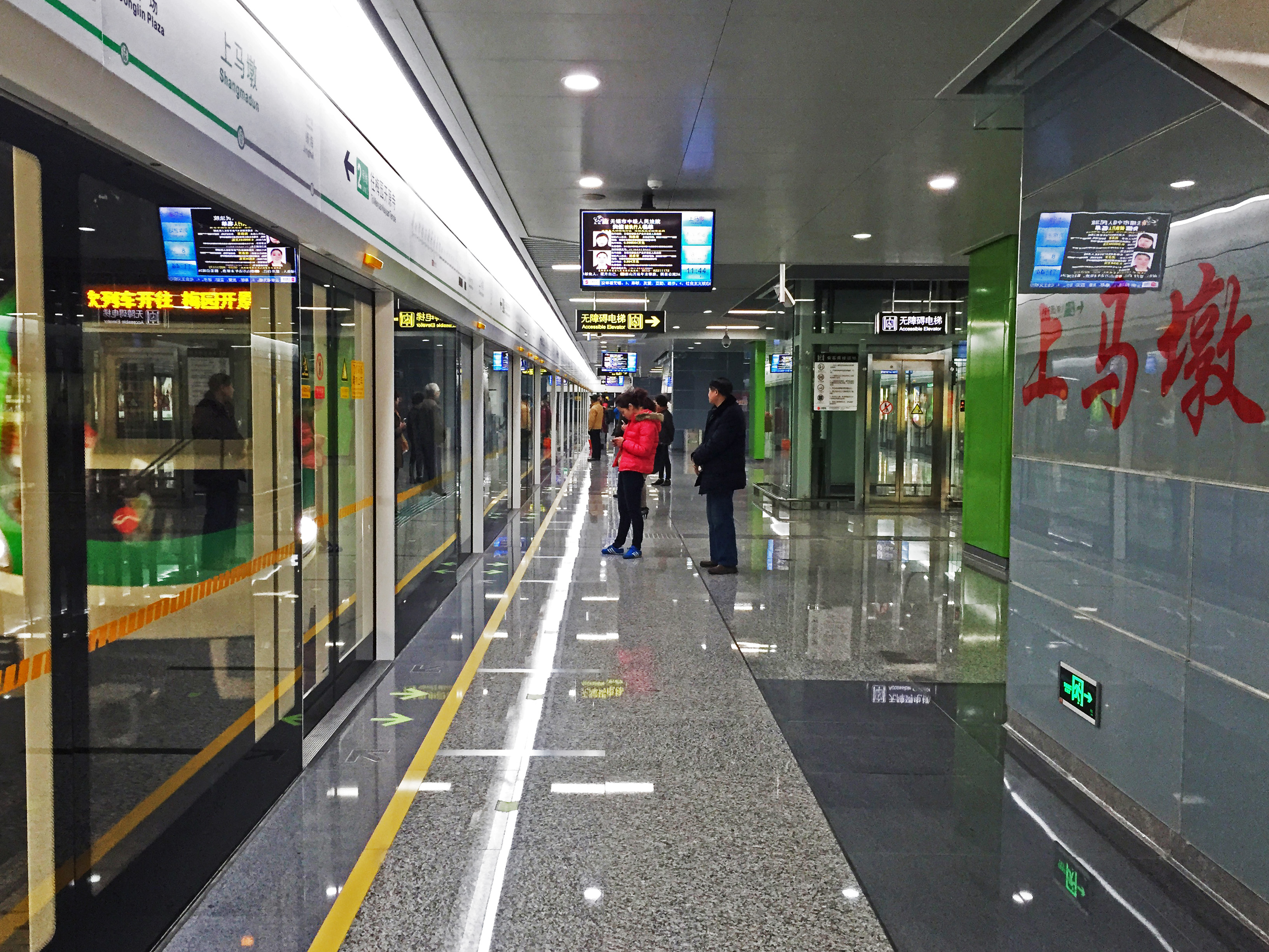 無錫地鐵上馬墩站站臺